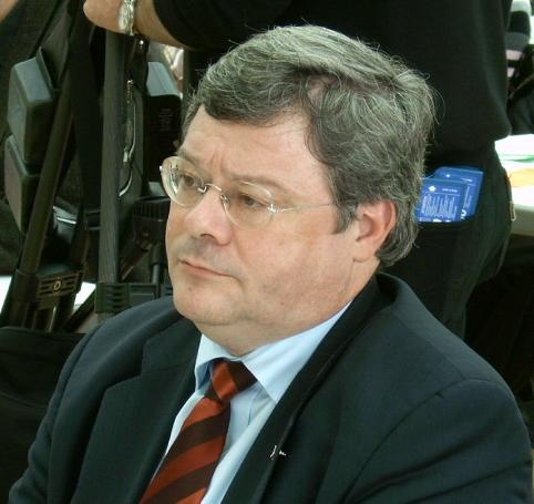 Reinhard Bütikofer auf einem Parteitag der Grünen im Trier